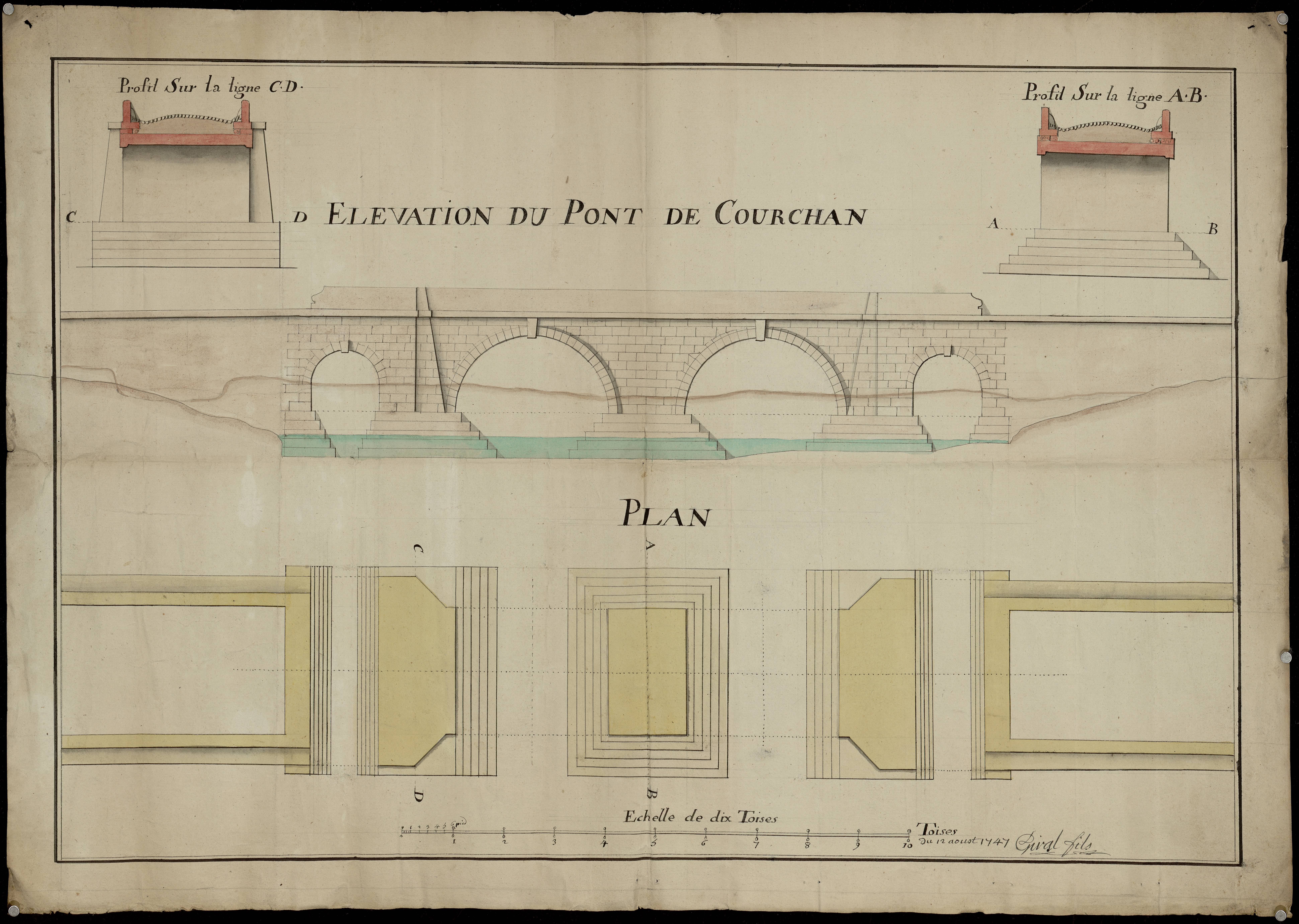 Saint-Sériès. - Plan, coupe, profil et élévation du pont de Courchan